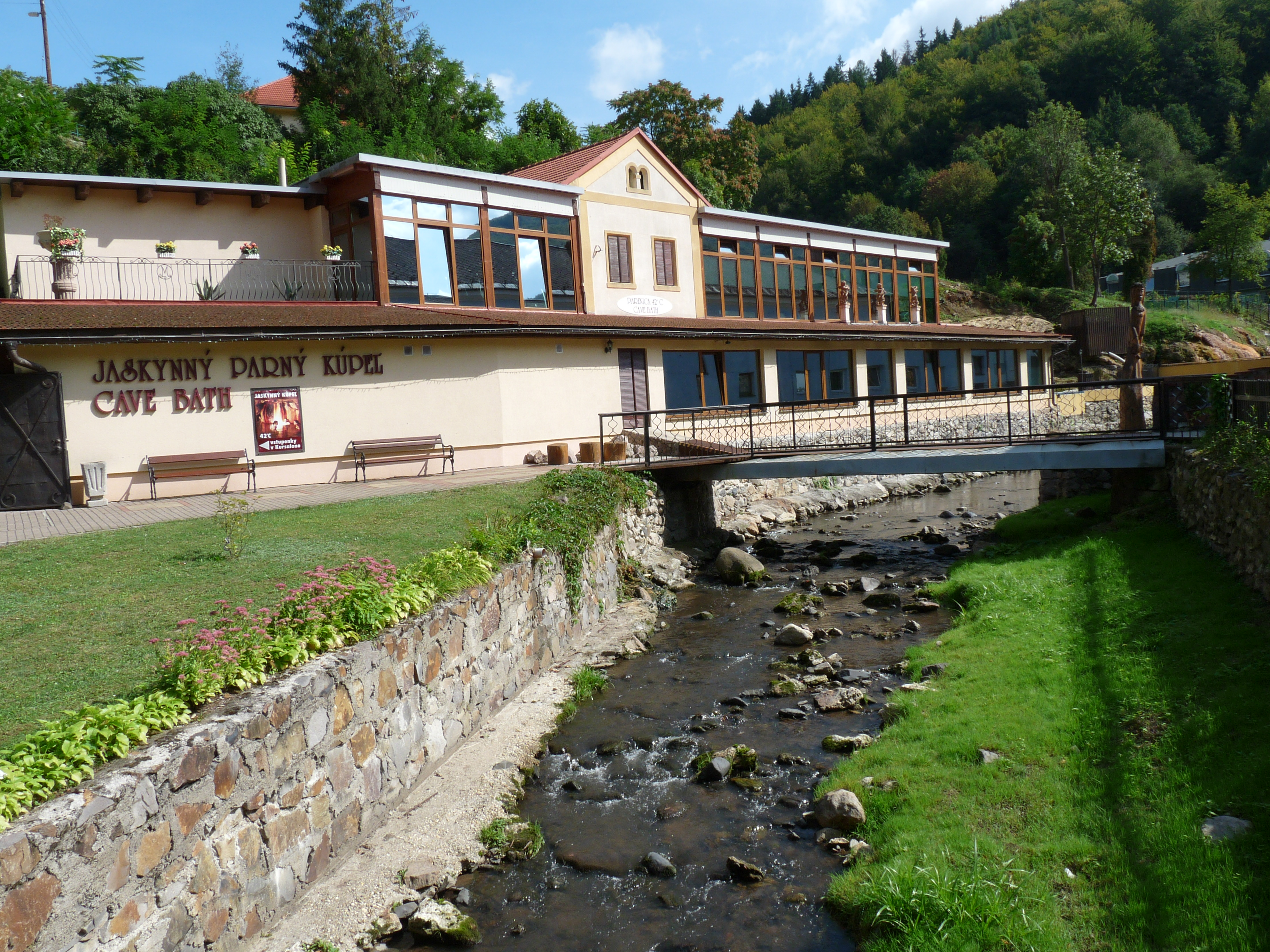 Jaskynný parný kúpeľ v Sklených Tepliciach